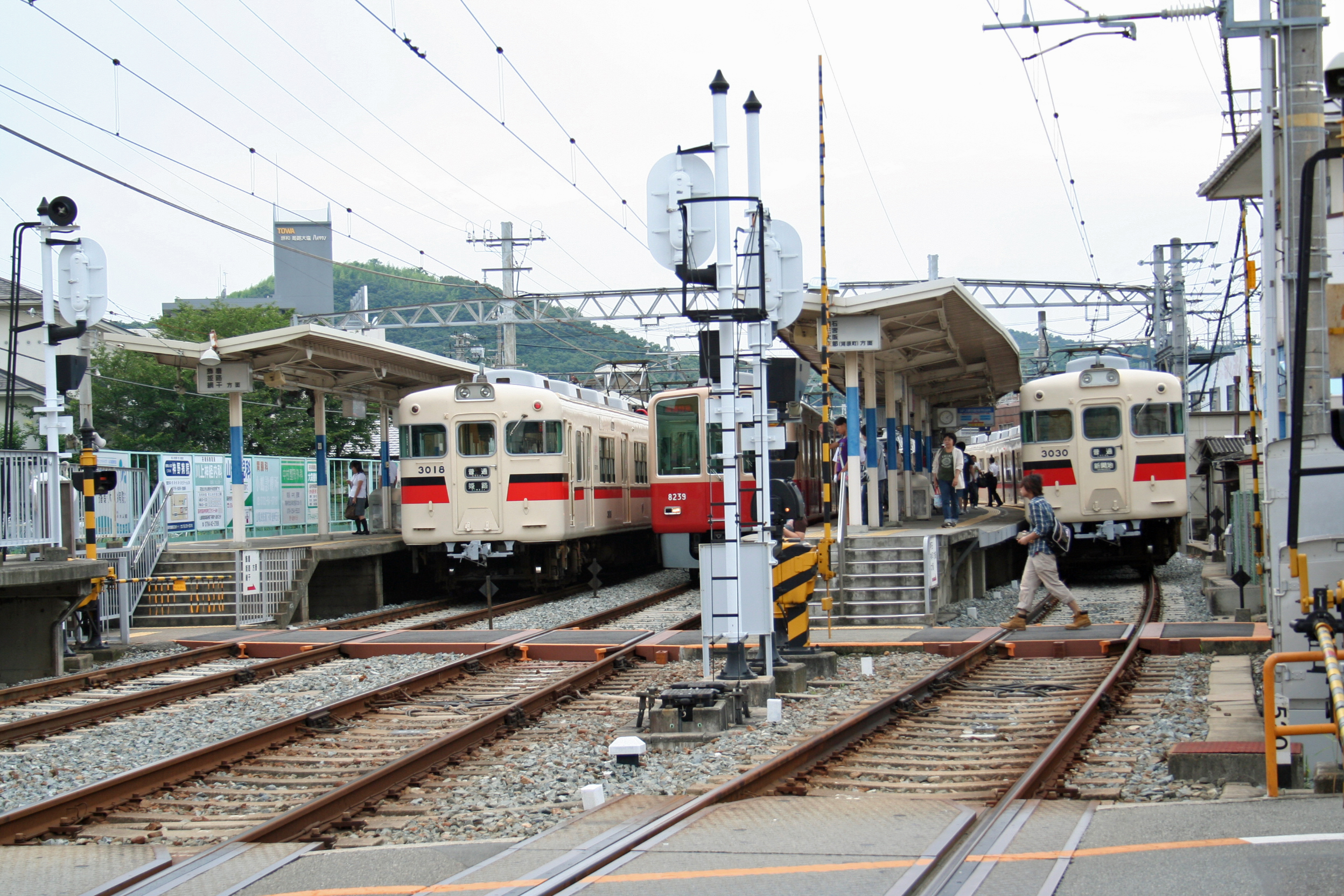 大塩駅東にある踏み切りから見た大塩駅上下線ホーム。